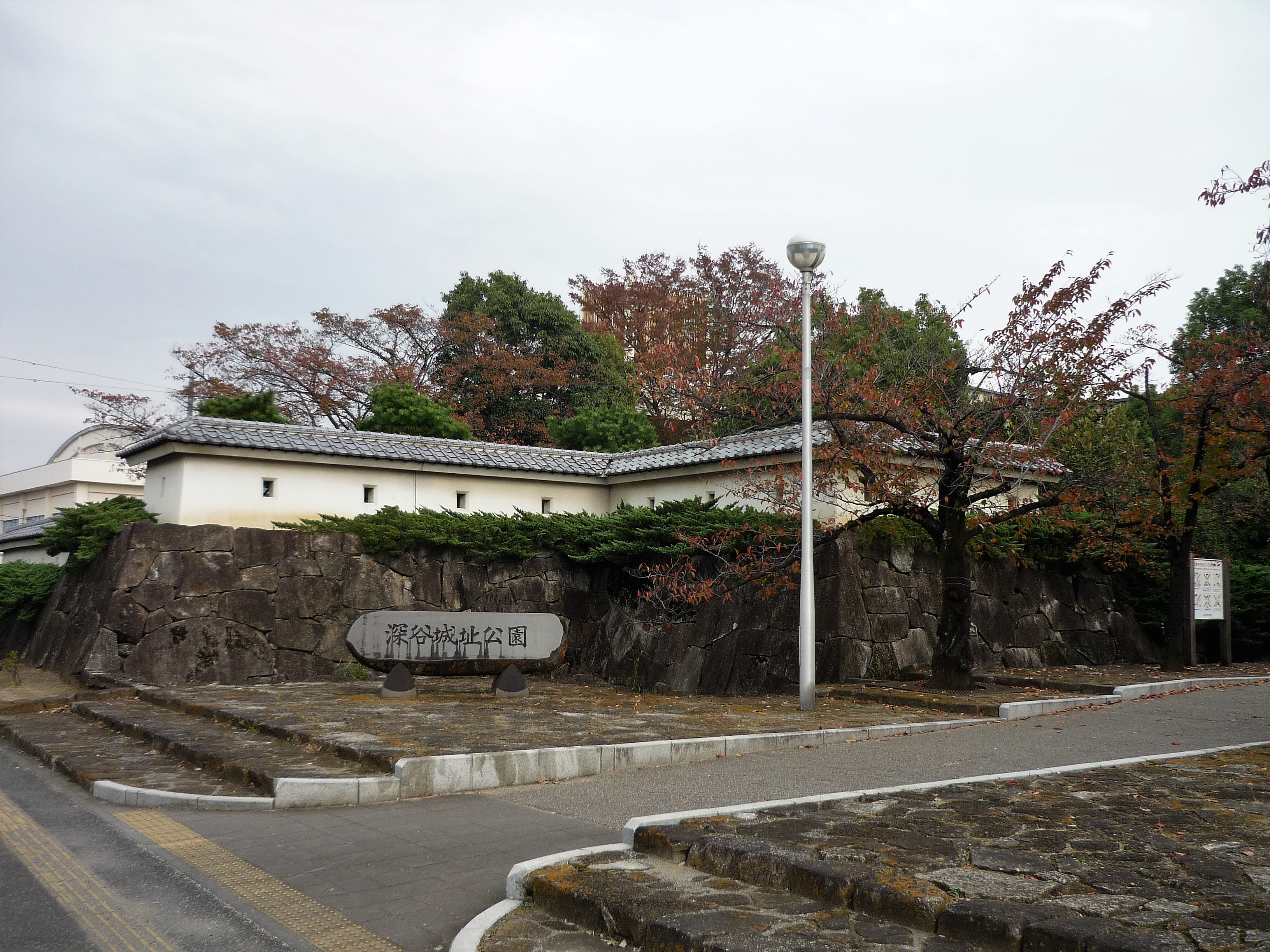 深谷城址公園 Panasonic Lumix DMC-FS3